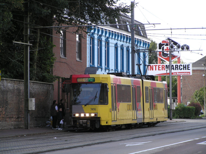 Tram op het eindpunt van de (pre)metrolijn van Charleroi naar Anderlues.